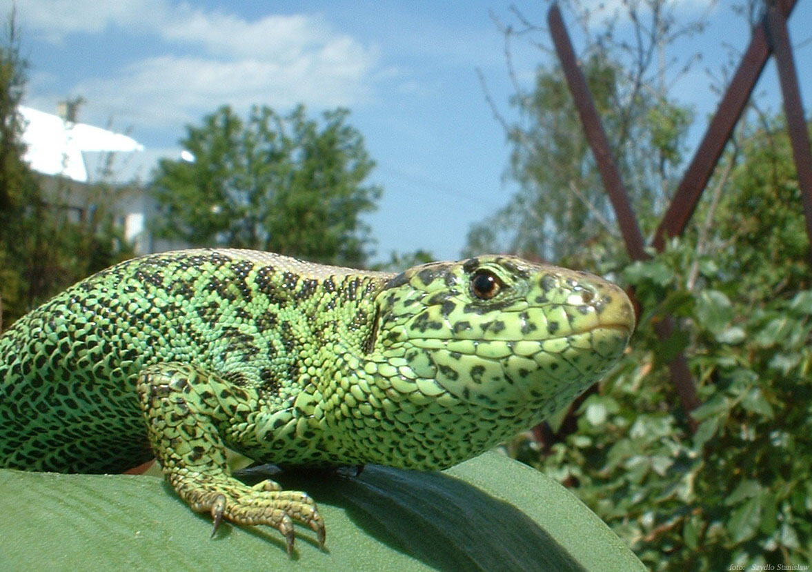 Jaszczurka zwinka (Lacerta agilis)